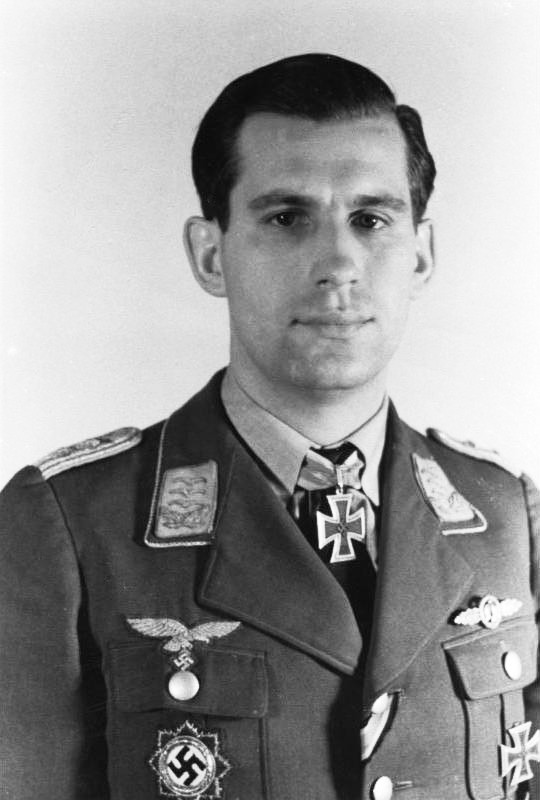 Bildberichter: Lt. Seuffert Ort: Holland Datum 10.12.43 Text: Hptm. Semrau, ein alter bewährter Nachtjäger und Träger des Ritterkreuzes.